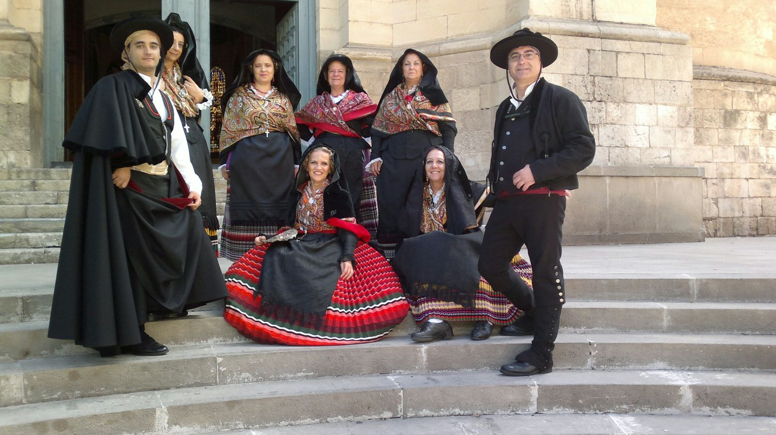 Miembros del grupo de folclore "Raíces del Llano" luciendo el traje típico de manchego durante la Feria de Albacete de 2015.